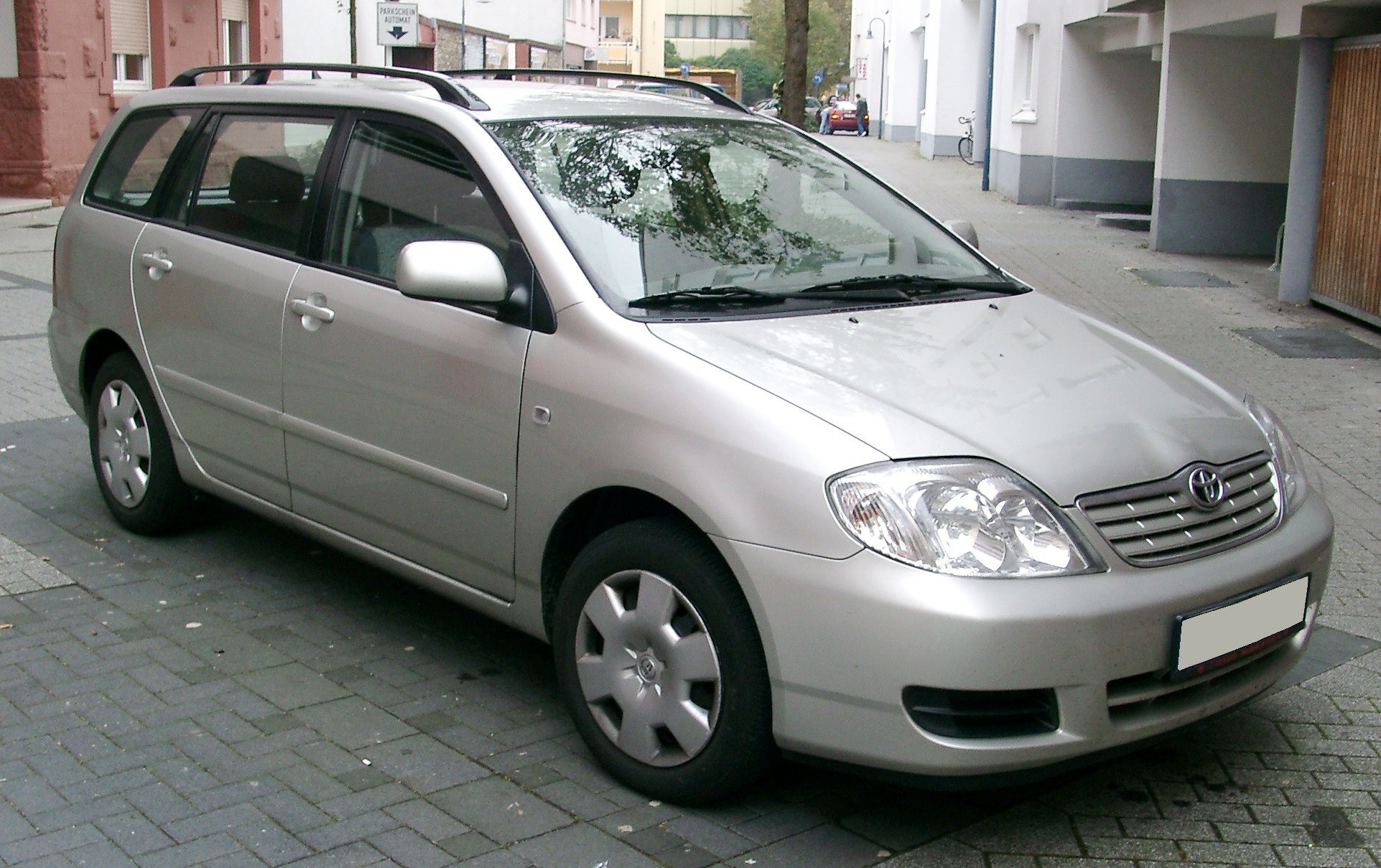 Toyota Corolla E120